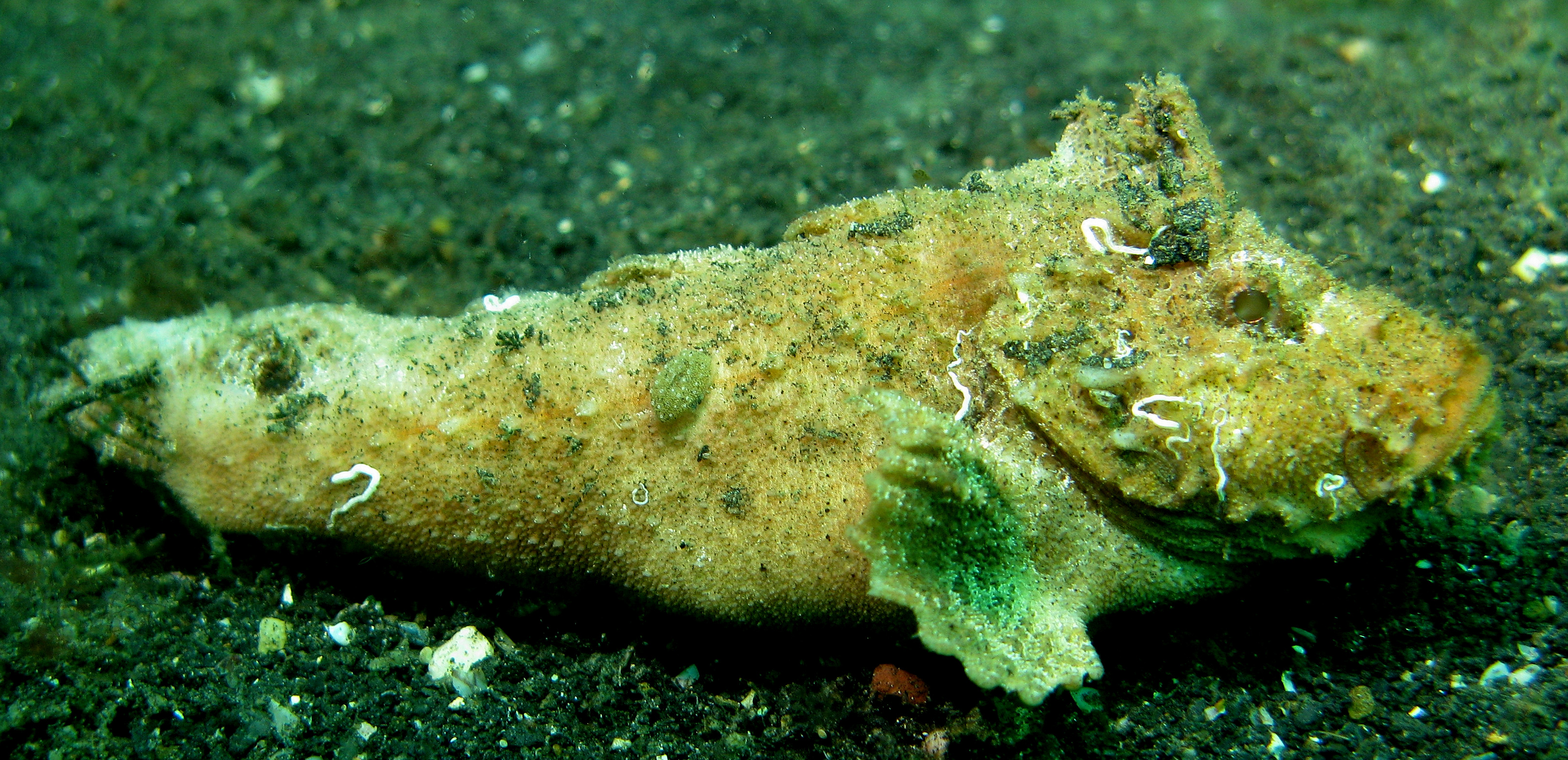 Velvetfish